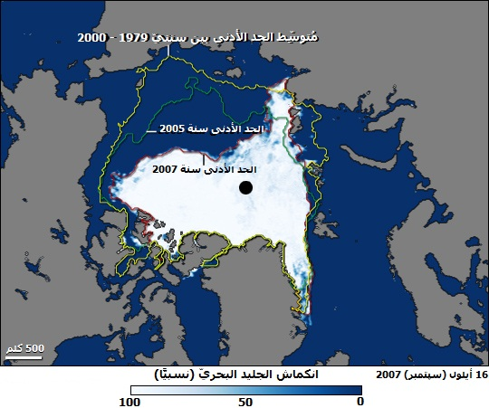 صُورةٌ تُظهرُ القُطب الشمالي كما شوهد بواسطة المقياس الماسح للموجات الشُعاعيَّة الصغيرة المُتقدِّم العائد لِجهاز مُراقبة الأرض المُتمركز على متن قمر أكوا الصناعي بتاريخ 16 أيلول (سبتمبر) 2007. تُظهرُ الصُورة الحد الأدنى المُسجّل لِتراجع الطبقة الجليديَّة بالقُطب الشمالي.